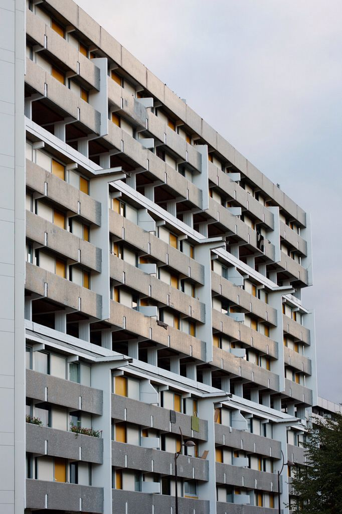 Une des immenses barres du Mirail, ici à Bellefontaine, ou "Belfont" dans le language populaire.